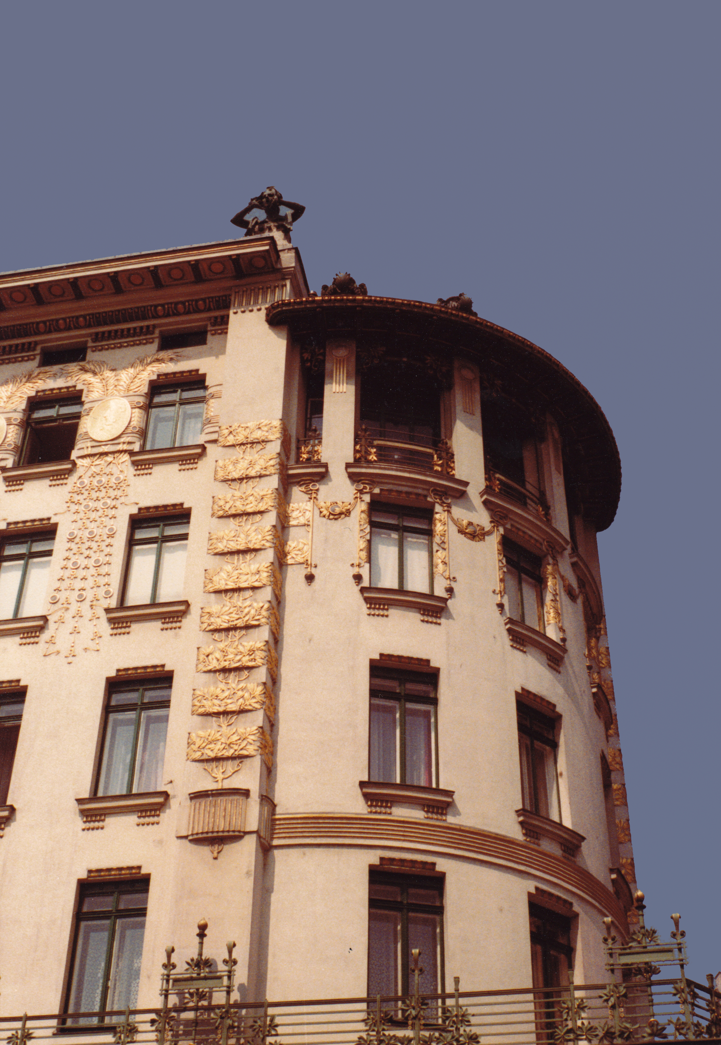 Autriche - Vienne - Linke Wienzeile 38 (architecte Otto Wagner)